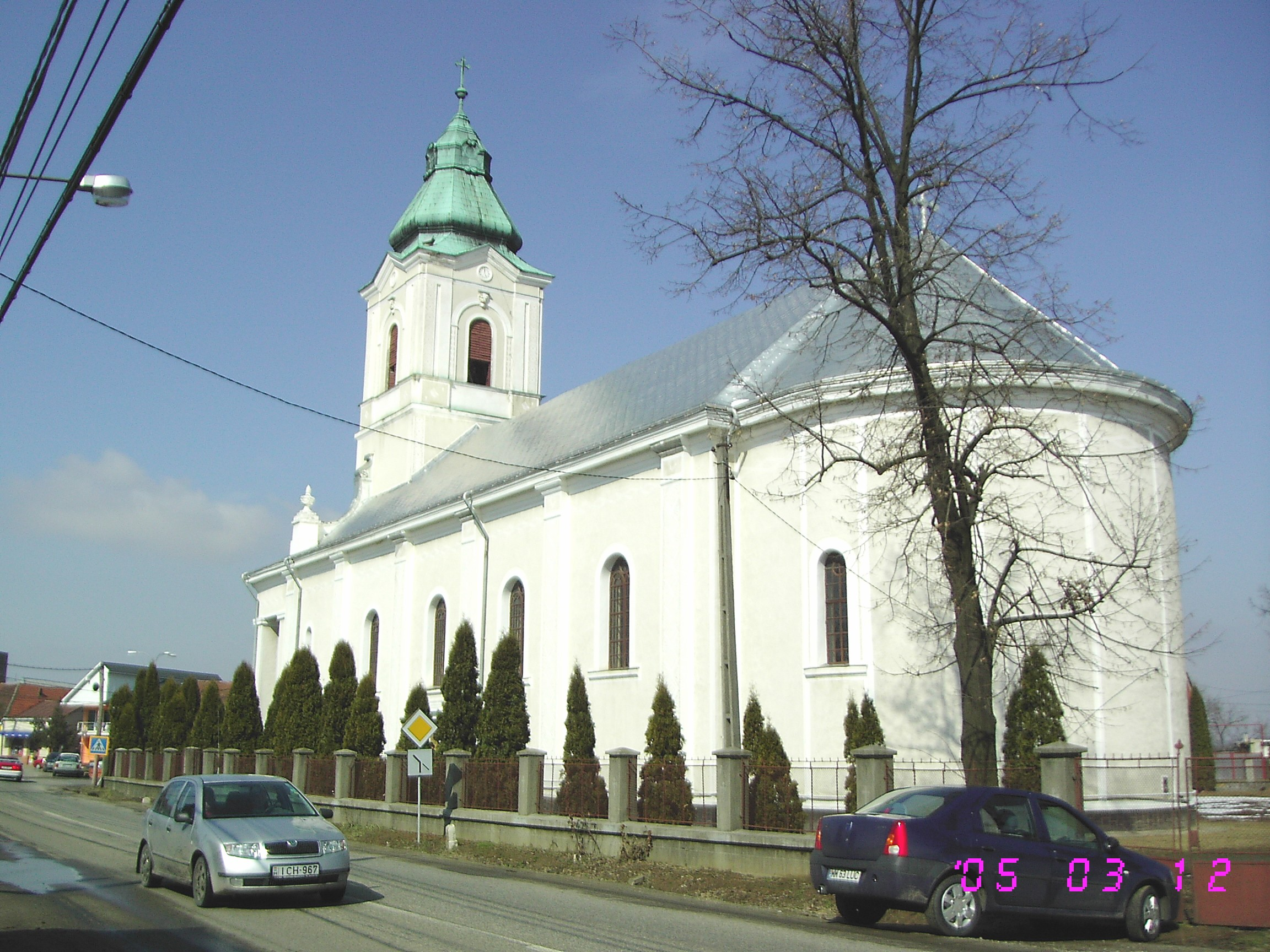 Biserica ortodoxa Seini